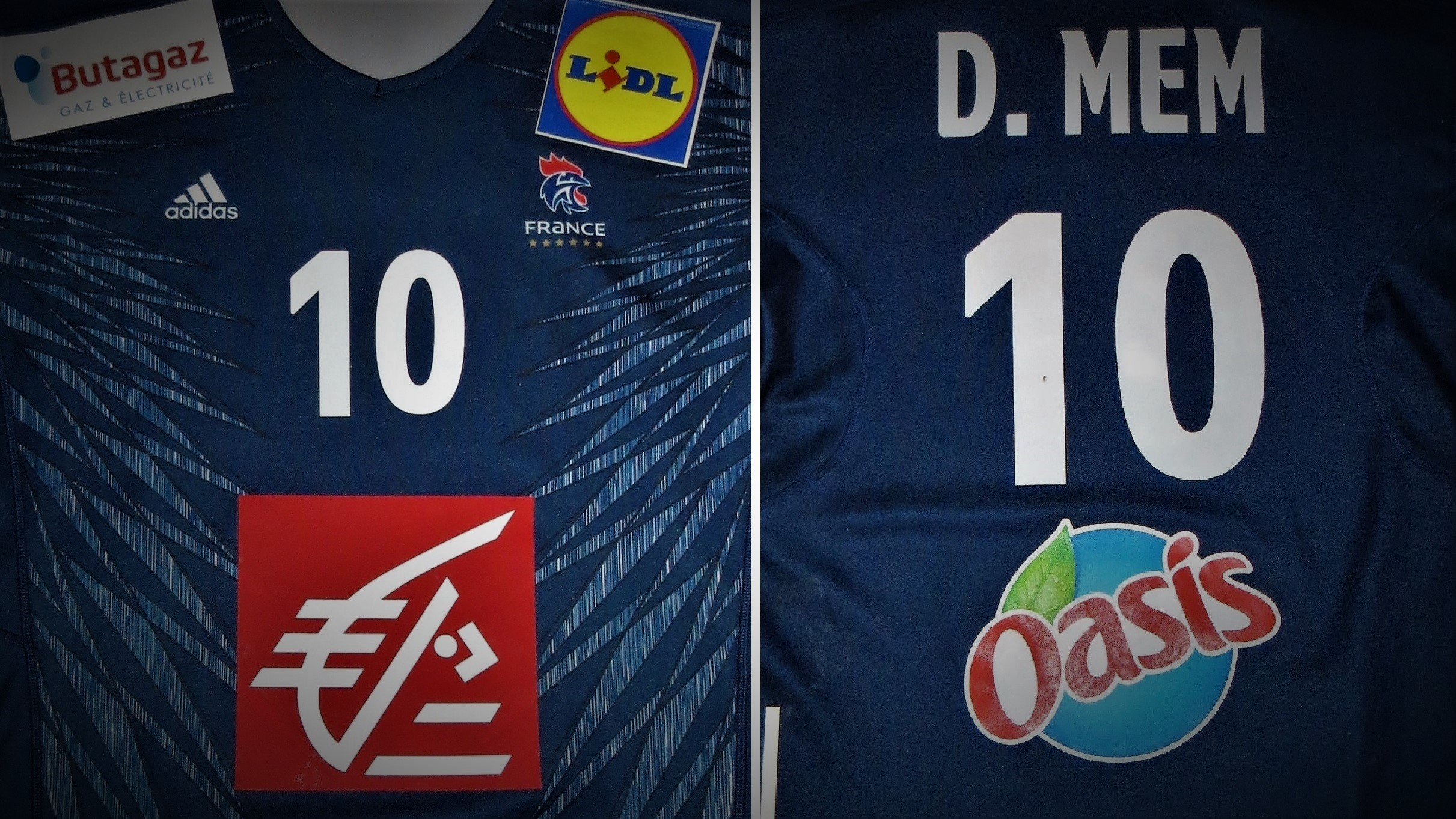 Dika Mem Jersey National Team